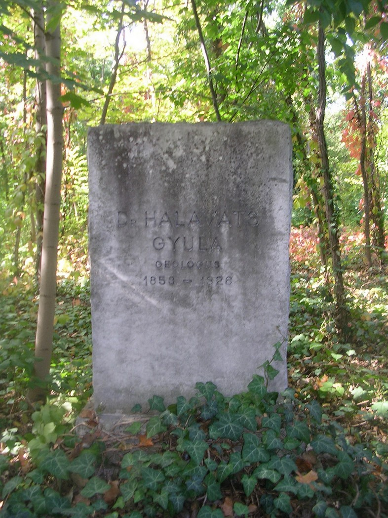 Halaváts Gyula sírja a Fiumei úti Nemzeti Sírkertben